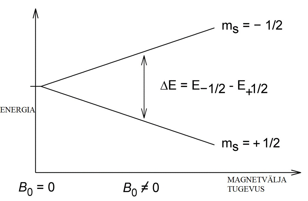 Kui väline magnetväli on suunatud üles, siis tuumad, mille spinn on +1/2 asuvad madalamal energianivool ja spinniga -1/2 tuumad asuvad kõrgemal energianivool.